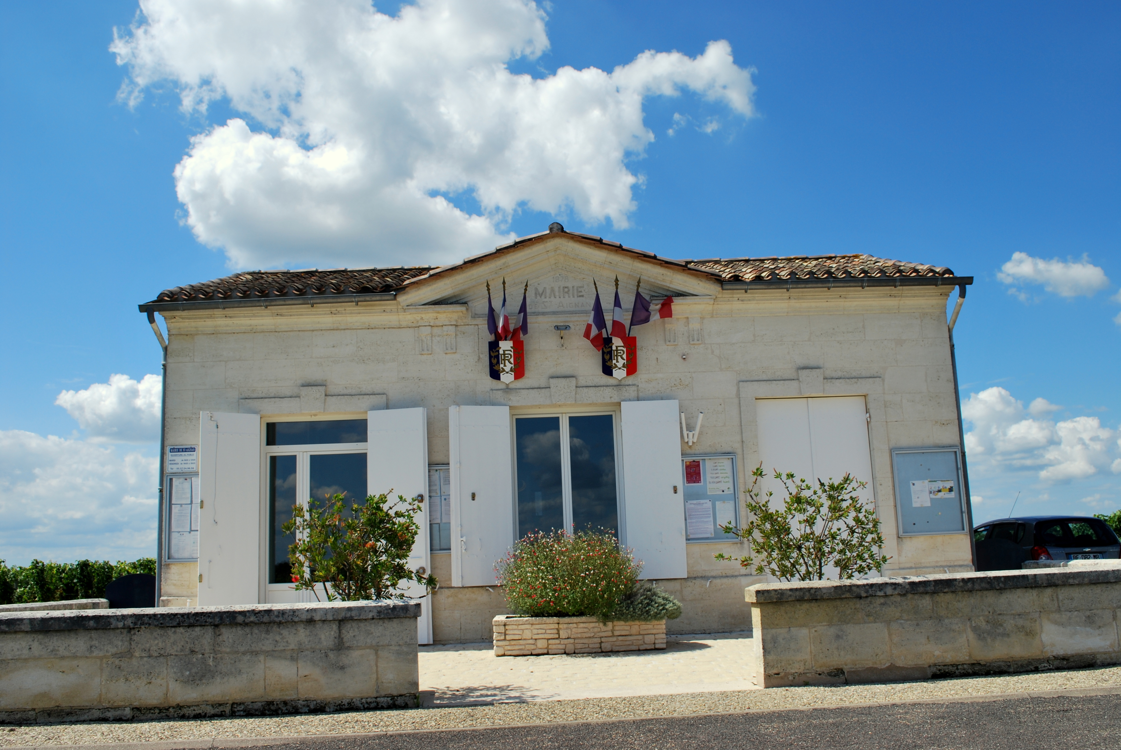 Saint-Aignan église le Nef 3